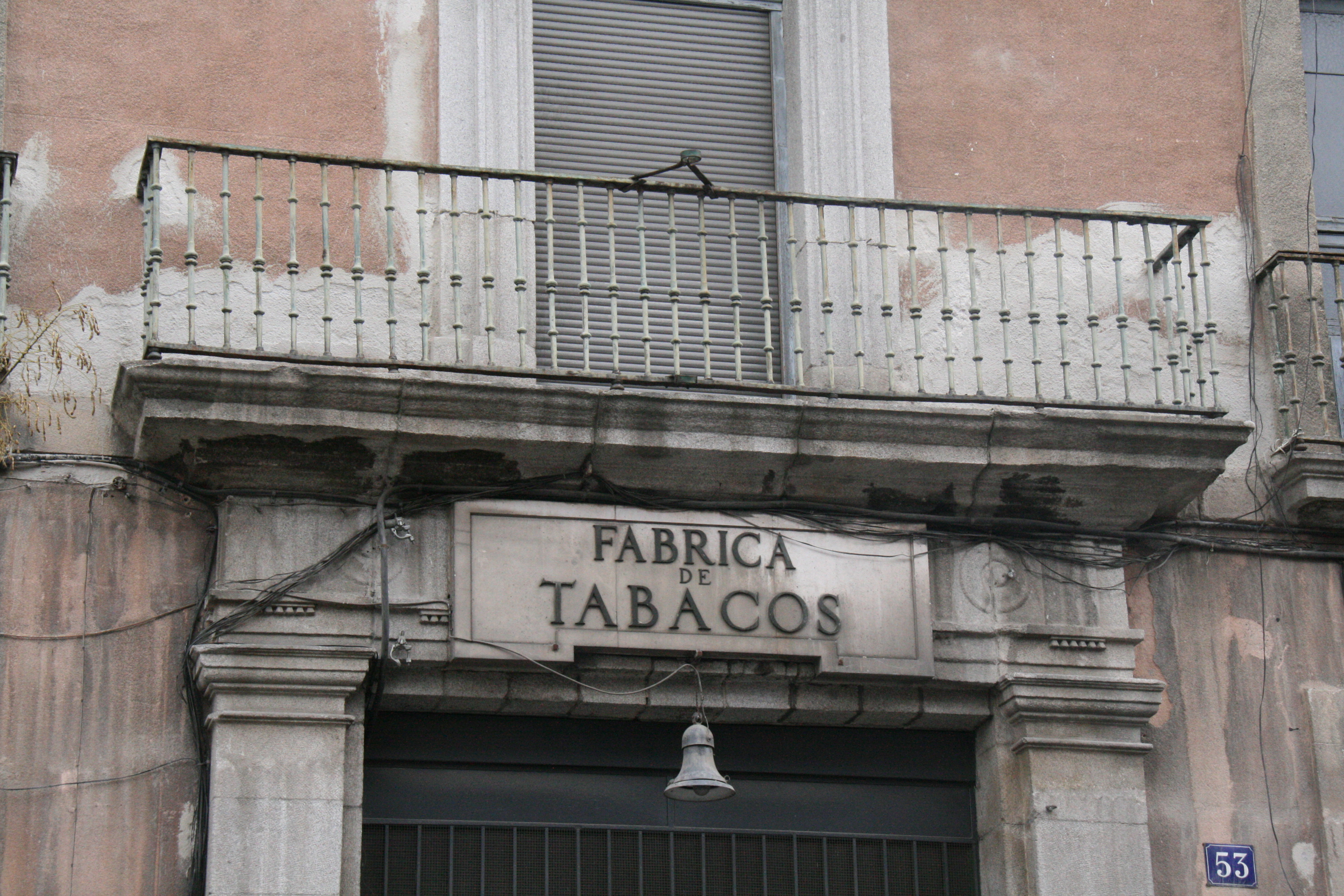 Fábrica de Tabacos de Embajadores